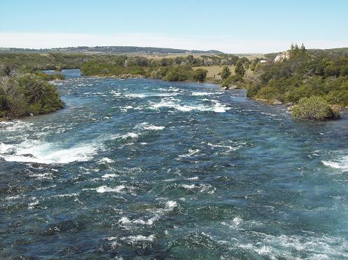 Ncimiento del río Carrenleufú desde el Lago Vintter.